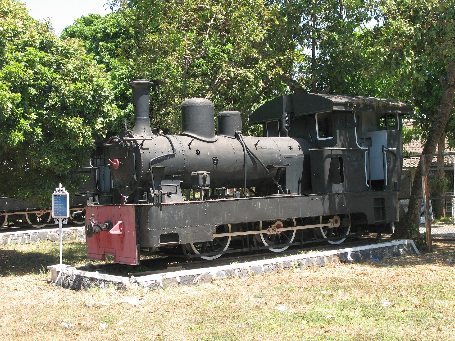 DKA C16 (C 16 03 D)